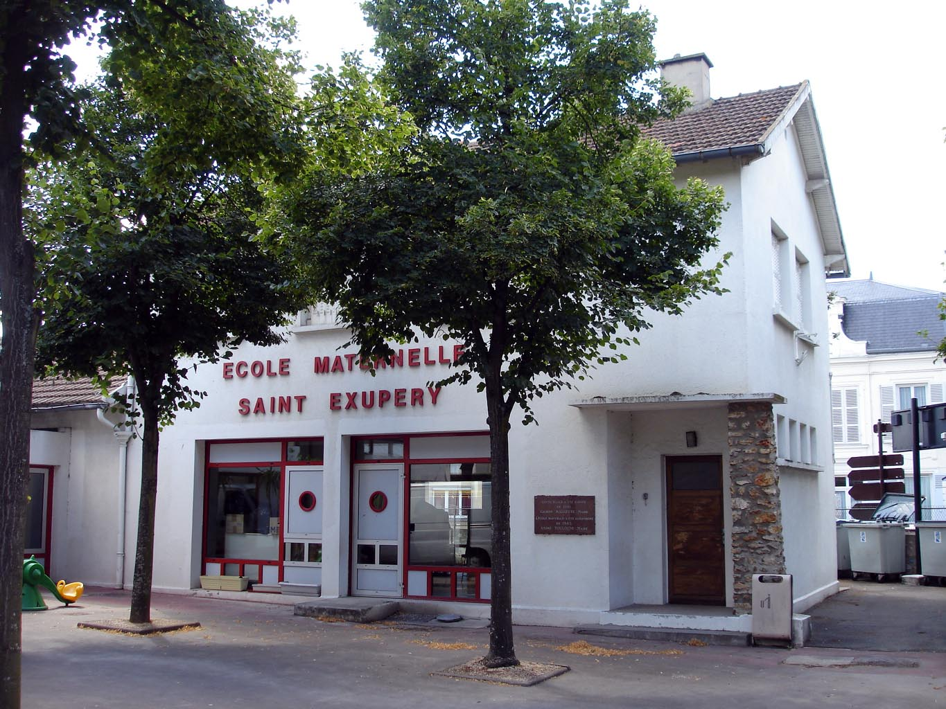 L'école maternelle Saint-Exupéry à Roissy-en-France (Val-d'Oise), France